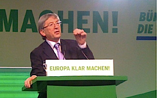 Jean-Claude Juncker auf dem Europa-Parteitag von Bündnis90/Die Grünen, 23. Jan. 2009, Dortmund